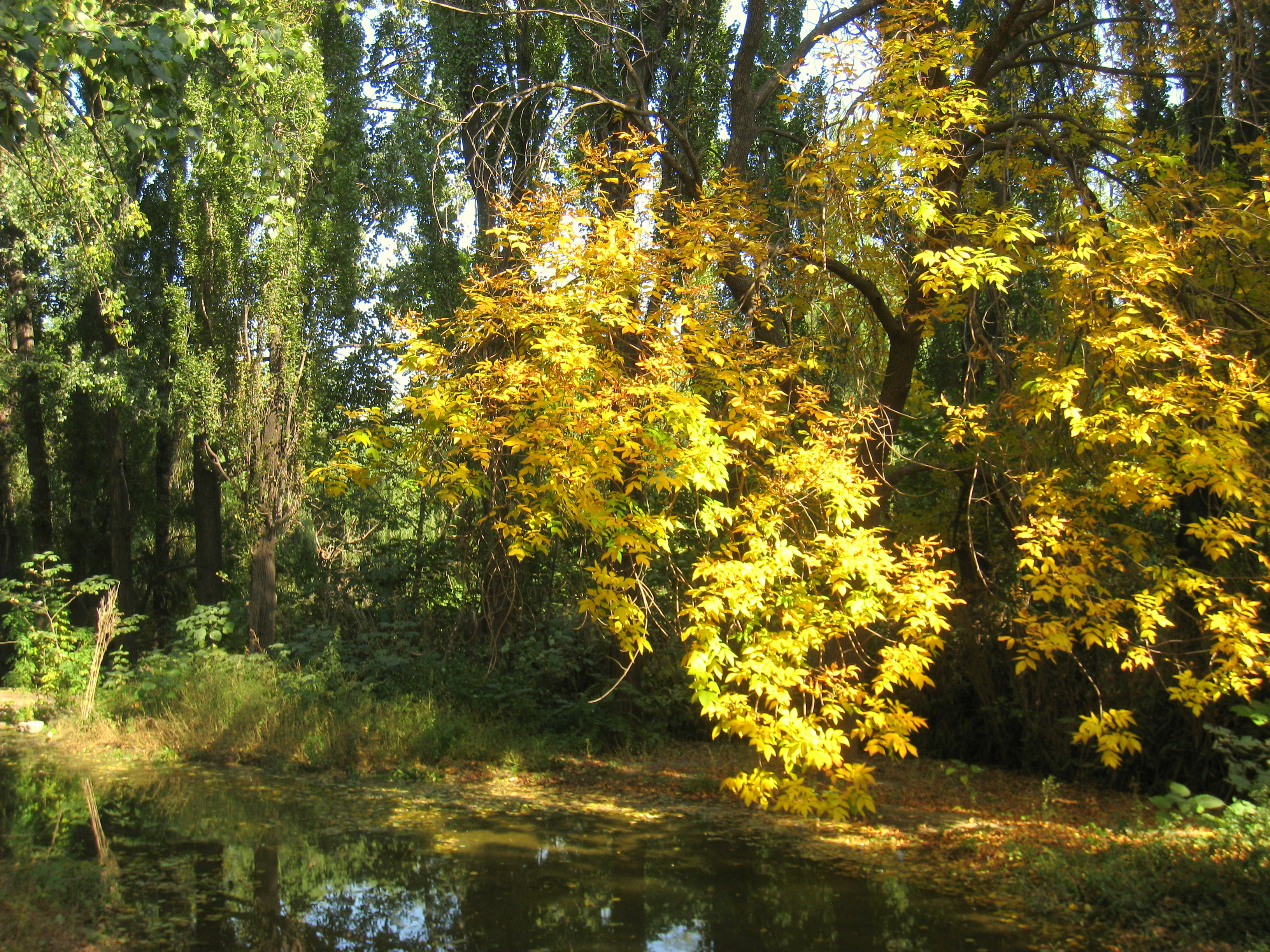 Beijing Zoo (北京动物园), Beijing, China.